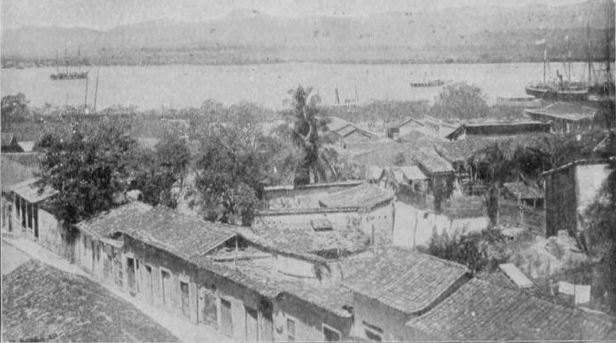 Cuba